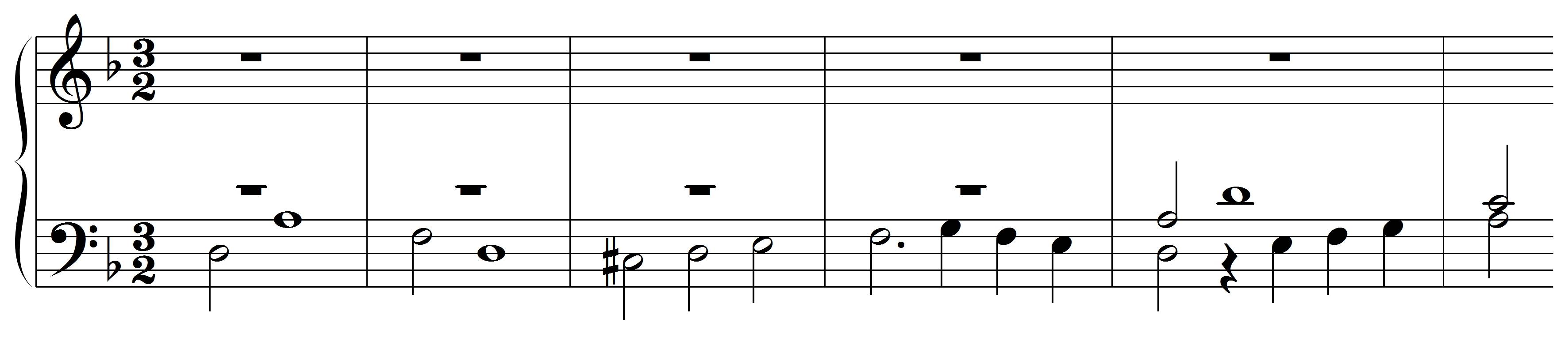 Bach, JS, Incipit Contrapunctus 12,1, BWV 1080